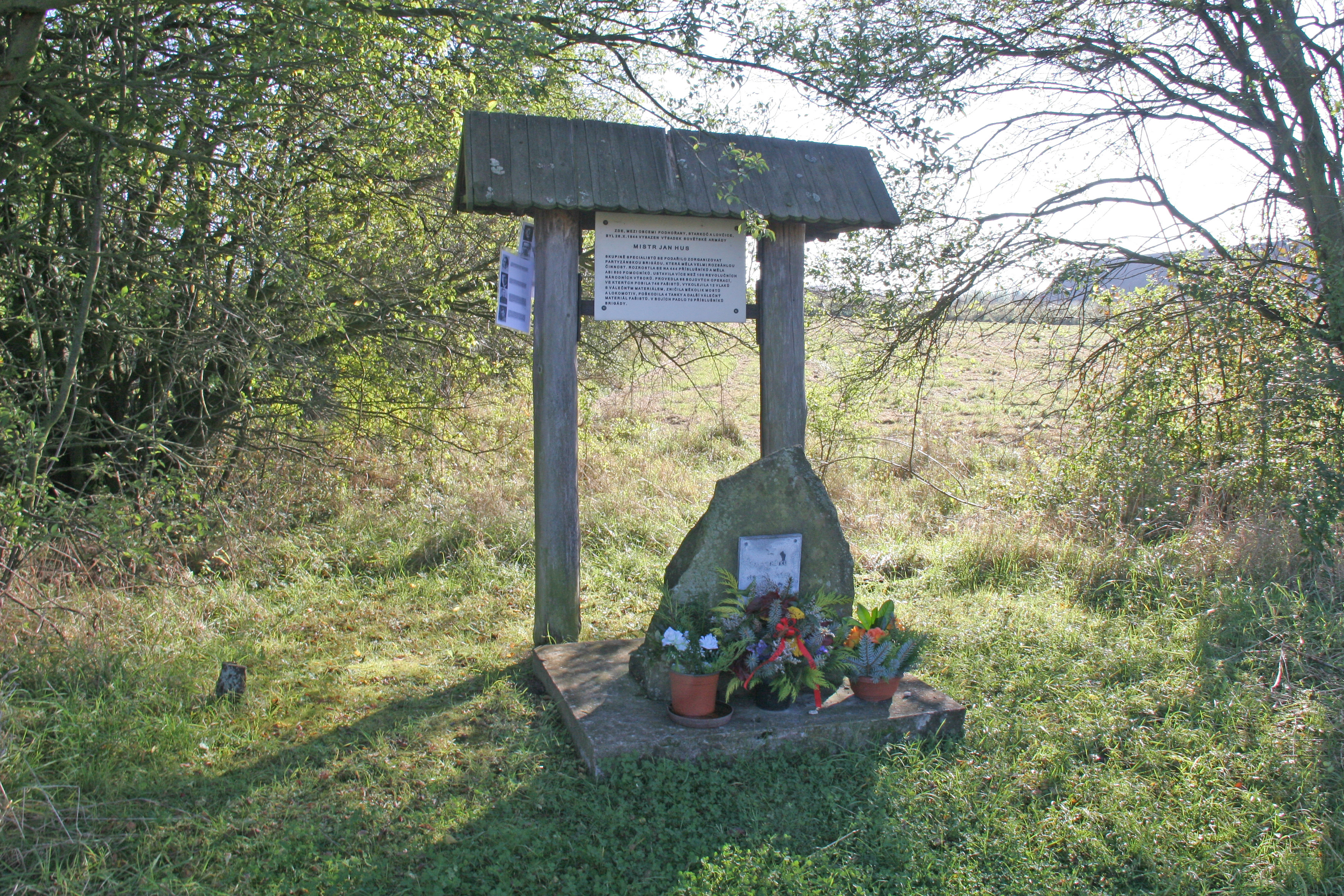 Pomník parašutistů u Lovčic